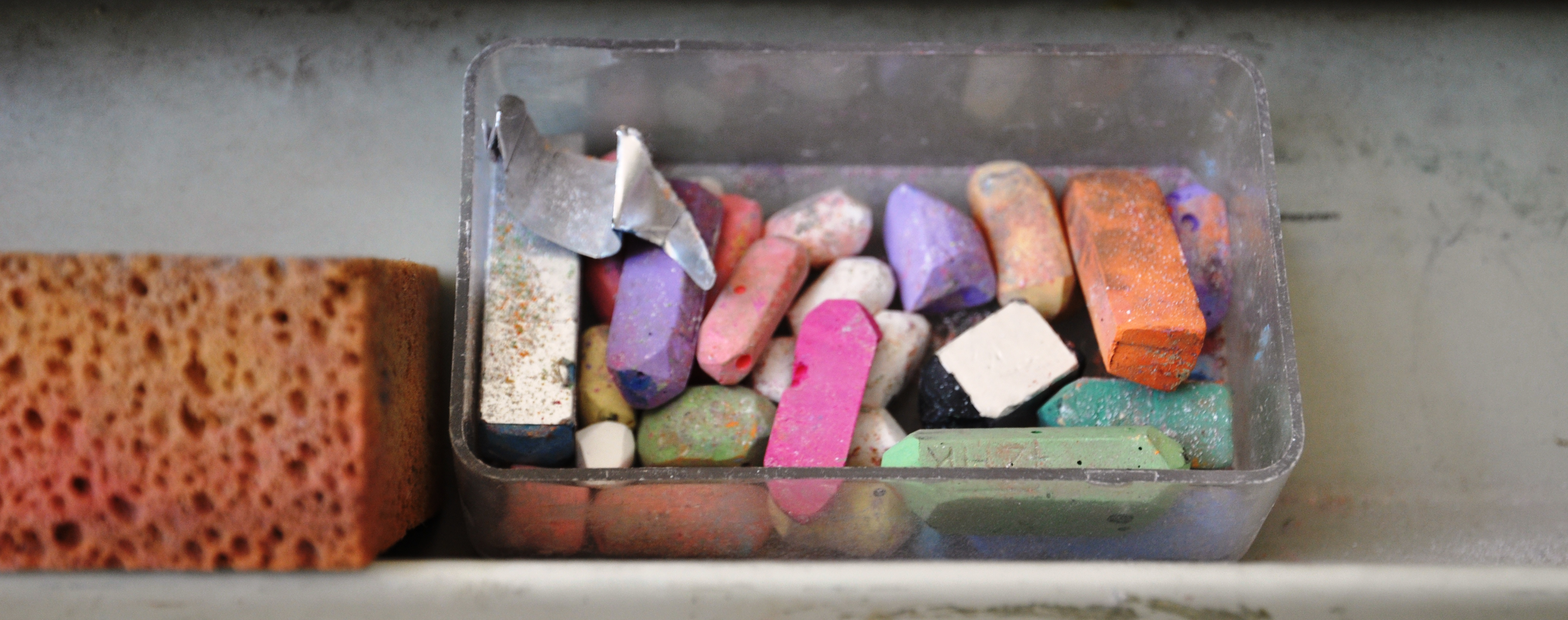 Spons en krijtjes op de Werkplaats Kindergemeenschap in Bilthoven.